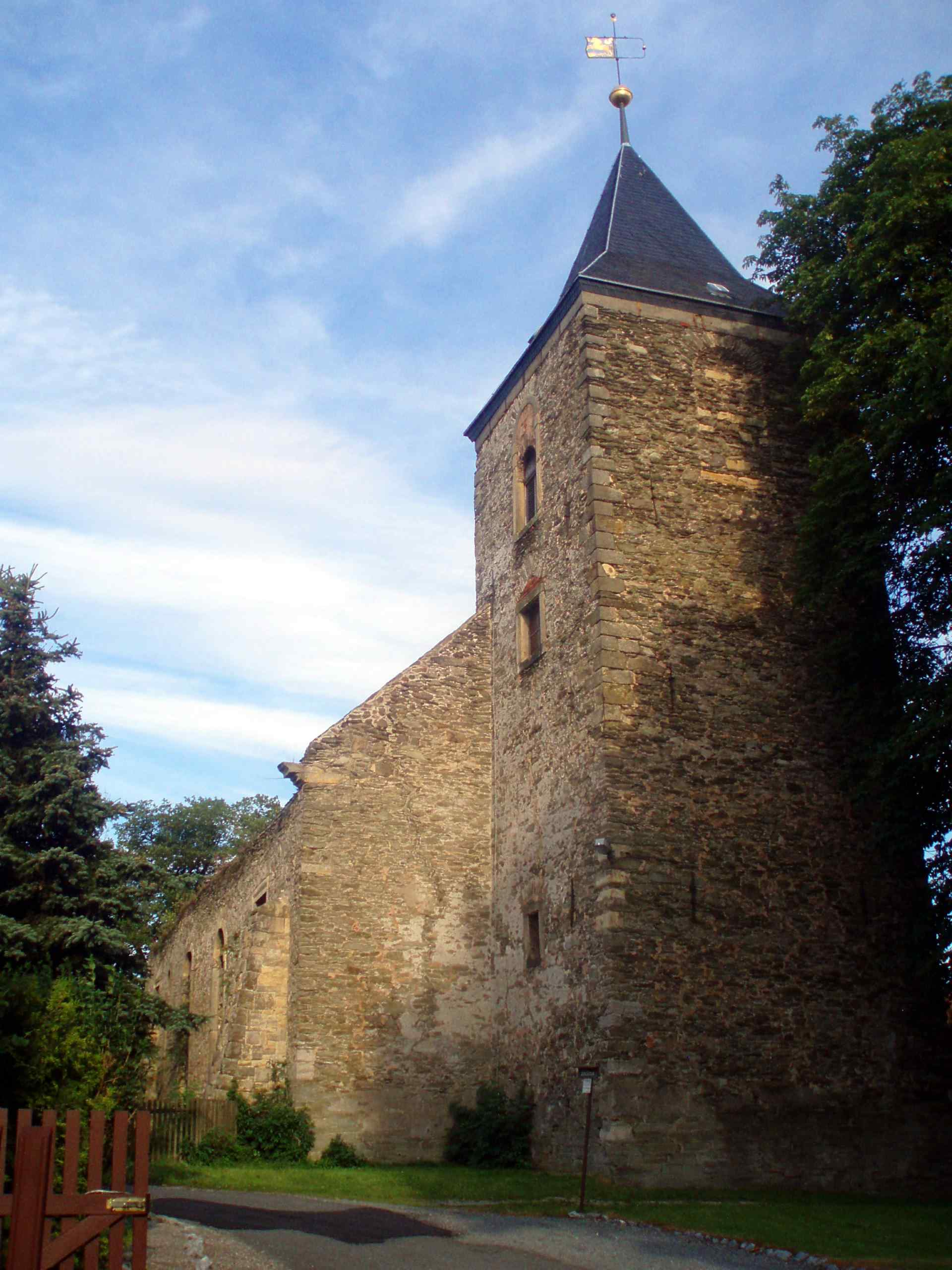 Kirche Hüttenrode